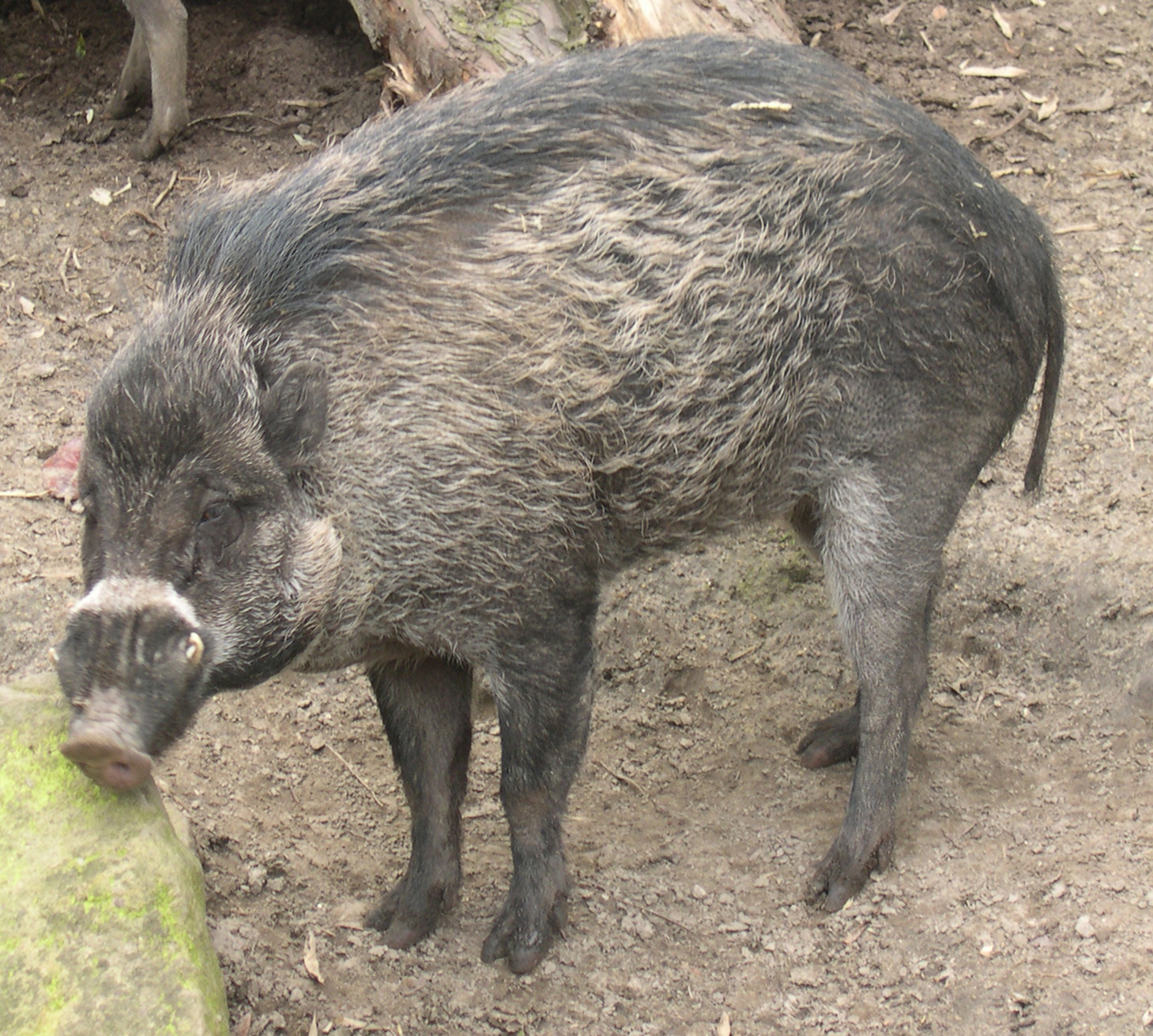 Een Visayawrattenzwijn (Sus cebifrons) in Diergaarde Blijdorp in Rotterdam